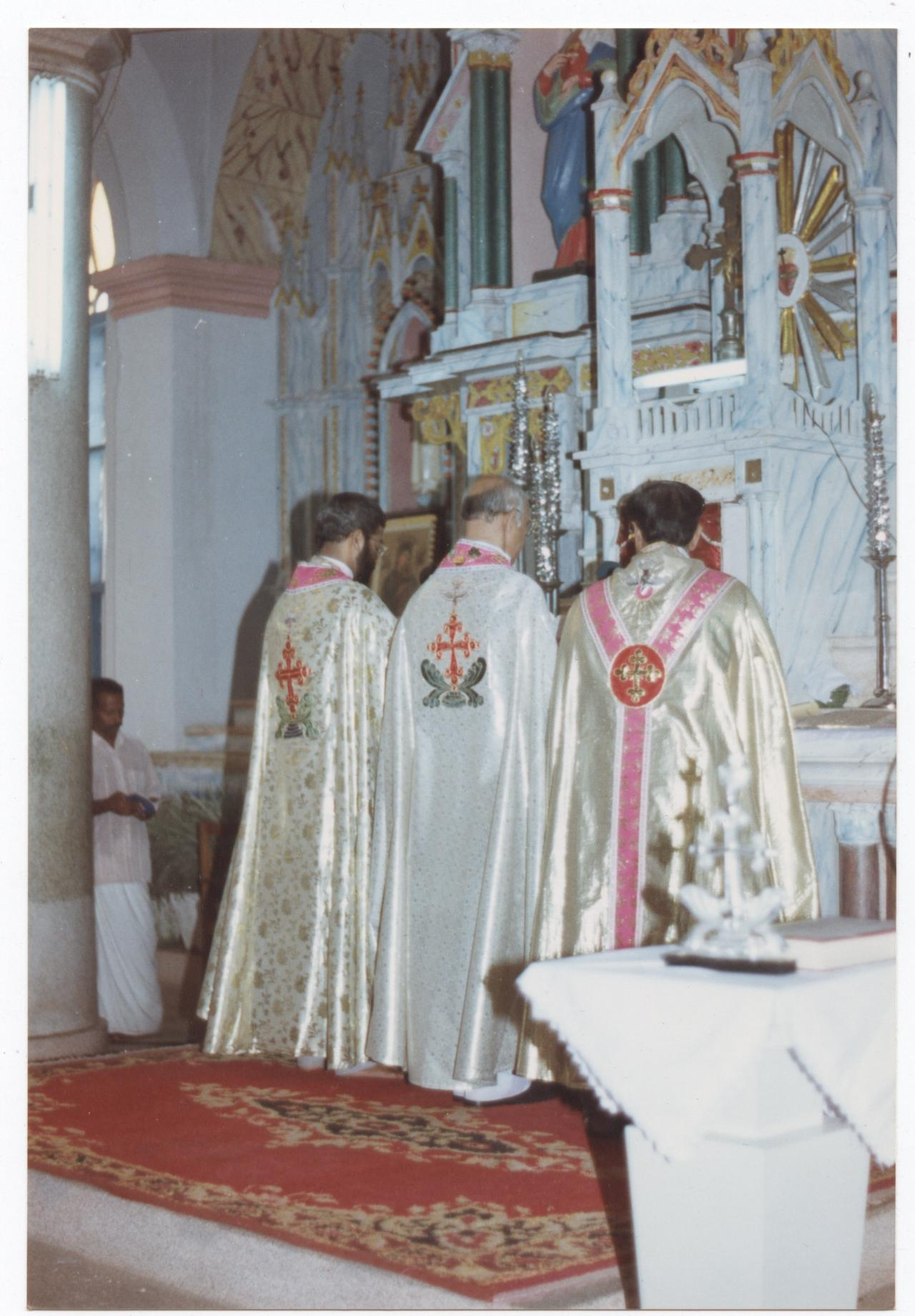 Bischof George Punnakottil (mittig); Pontifikalamt in seiner Kathedrale von Kothamangalam